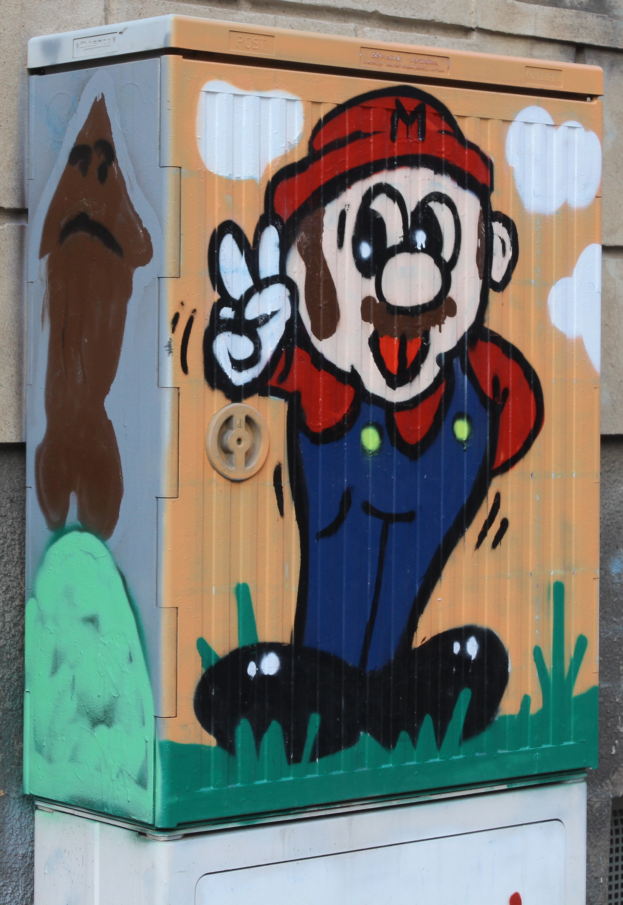 Streetart in Halle (Saale).